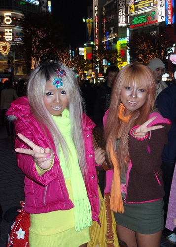 Ganguro style (Tokyo, Japan).